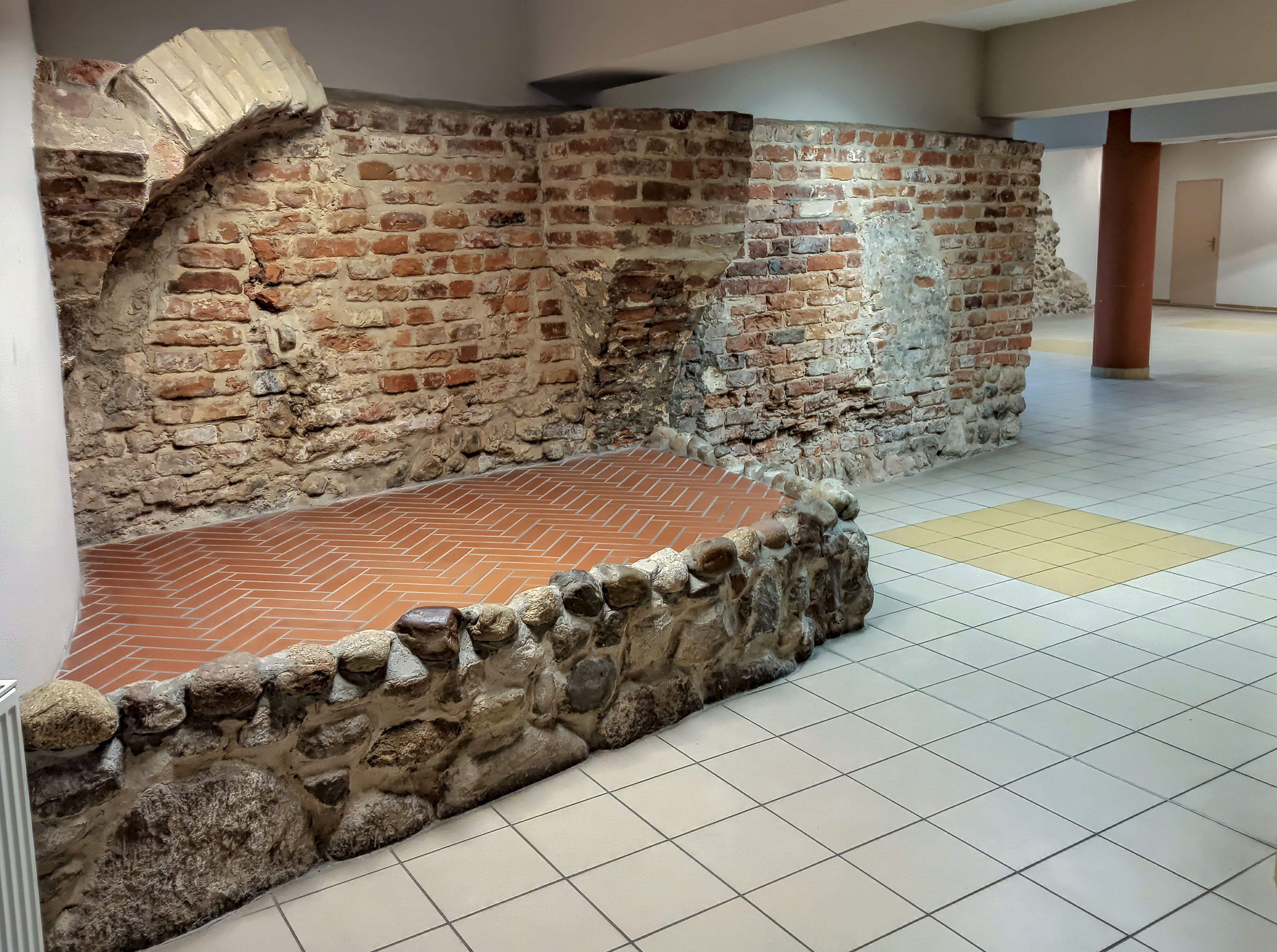 Braniewo Braniewskie Centrum Kultury Dwór Artusa w Braniewie piwnice